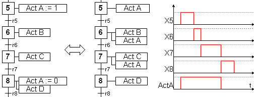 diagramme temporel pour expliquer l'action mémorisé d'un Grafcet.